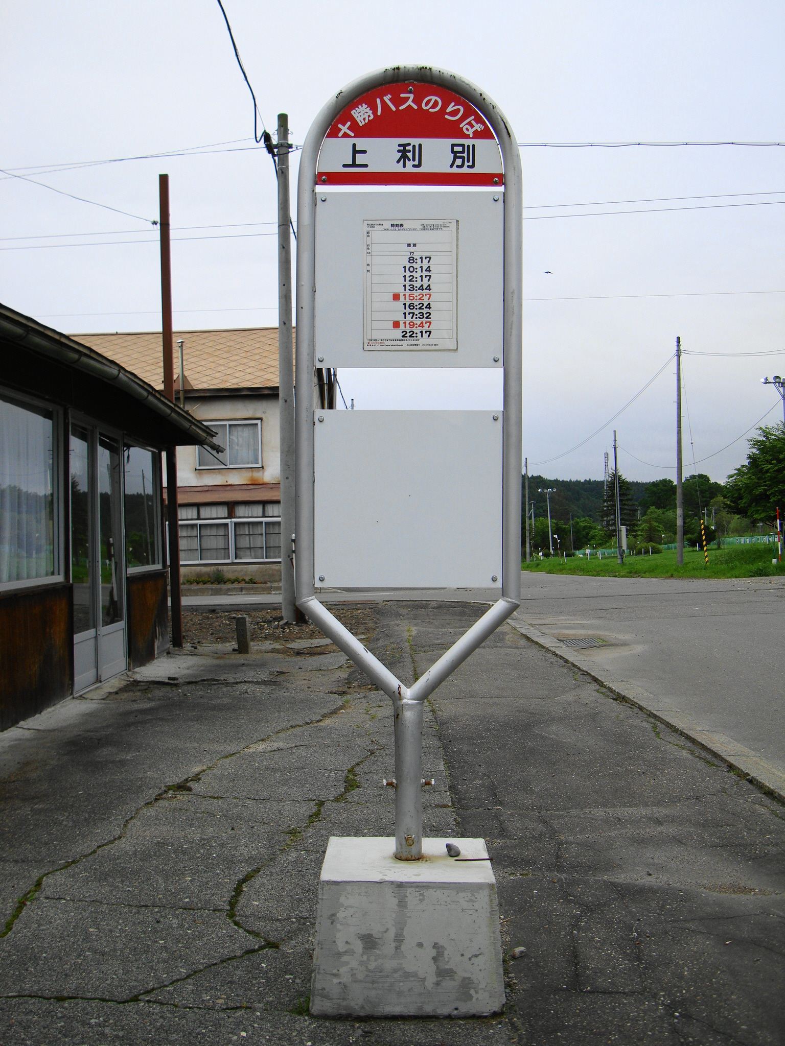 Furusato Ginga Line substitutional bus "Kami-Toshibetsu" Bus Stop